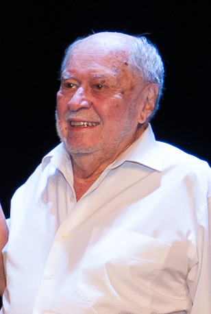 Jaime de Armiñán en la ceremonia de entrega del 14 Premio Corral de Comedias a Julia Gutiérrez Caba